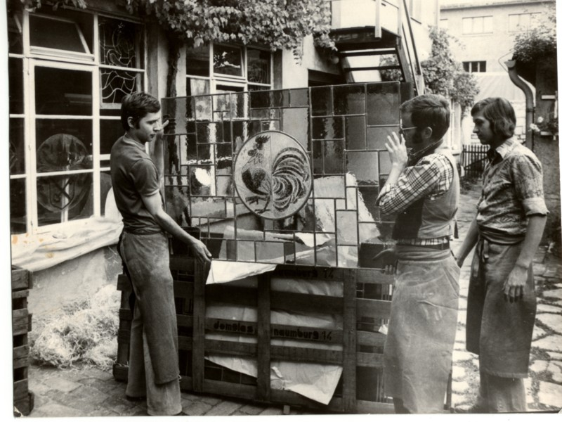 Archivbild